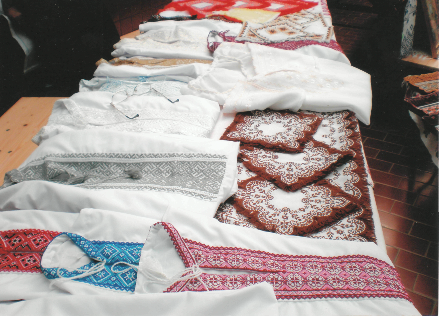 Роботи Магдалини Кучінки